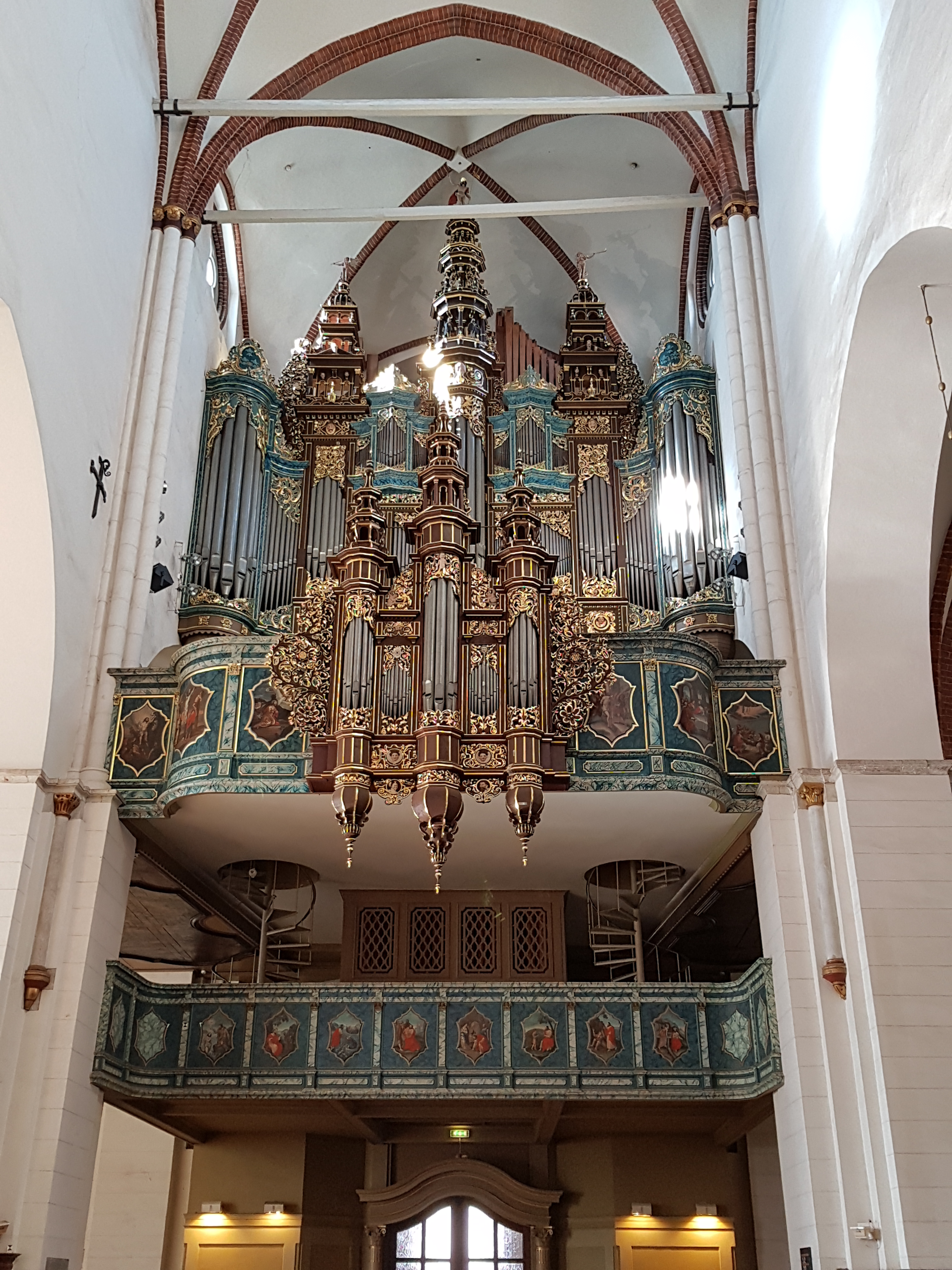 Rīgas Doma ērģeles, Centra rajons, Doma laukums 1